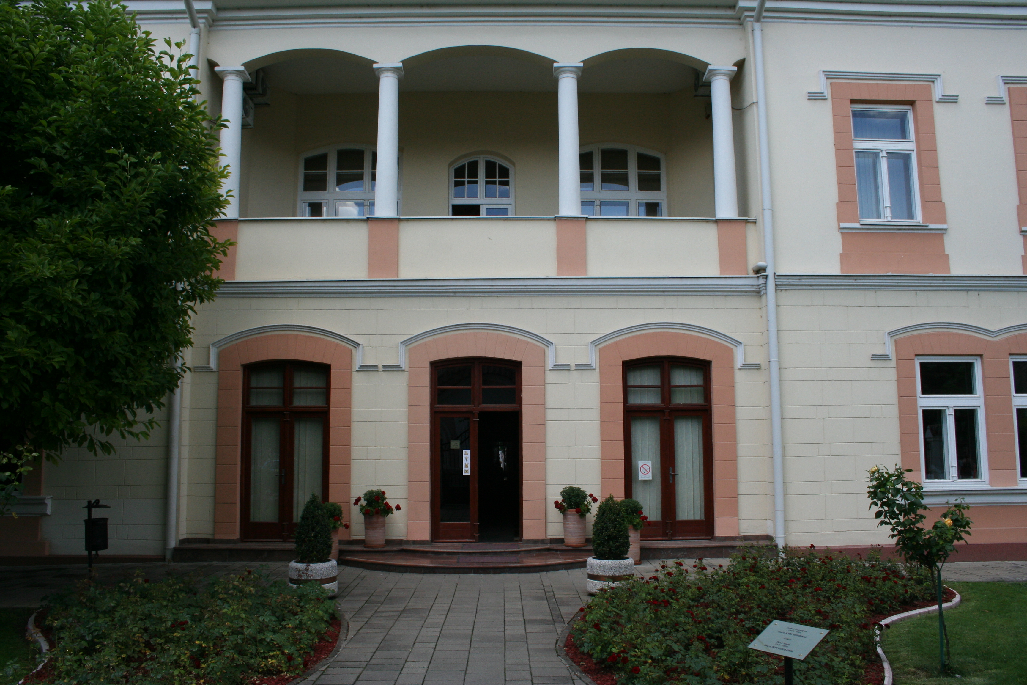 Zgrada vladičinog konaka, današnja zgrada biblioteke